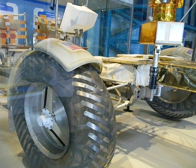 Détail de la roue avant du Rover lunaire, exposé au Kennedy Space Center Visitor Complex.